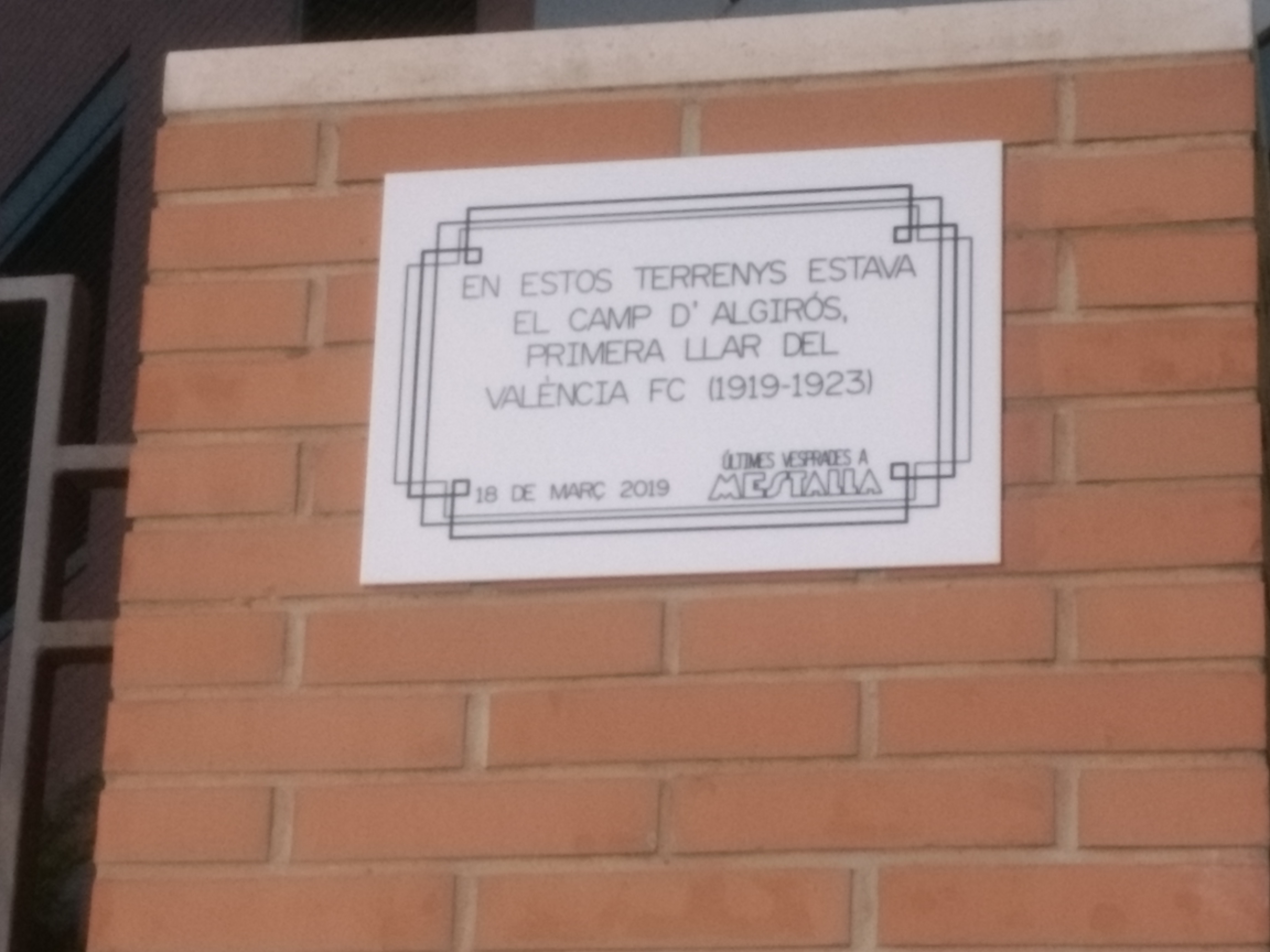 Placa que el col·lectiu 'Últimes Vesprades a Mestalla' va ubicar on es trobava l'antic camp d'Algirós